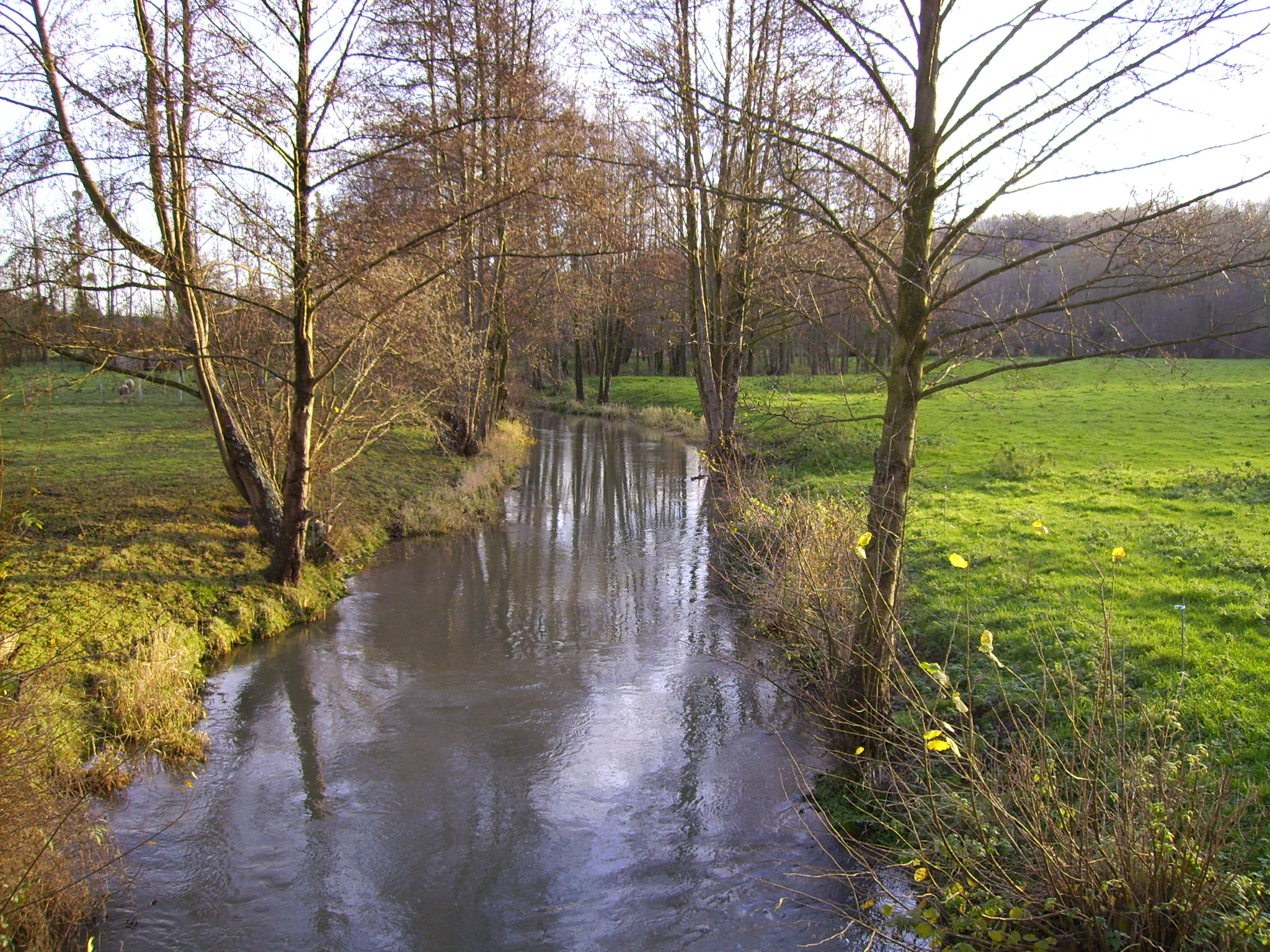 La rivière Calonne à Saint-Pierre-de-Cormeilles aux Bréards.